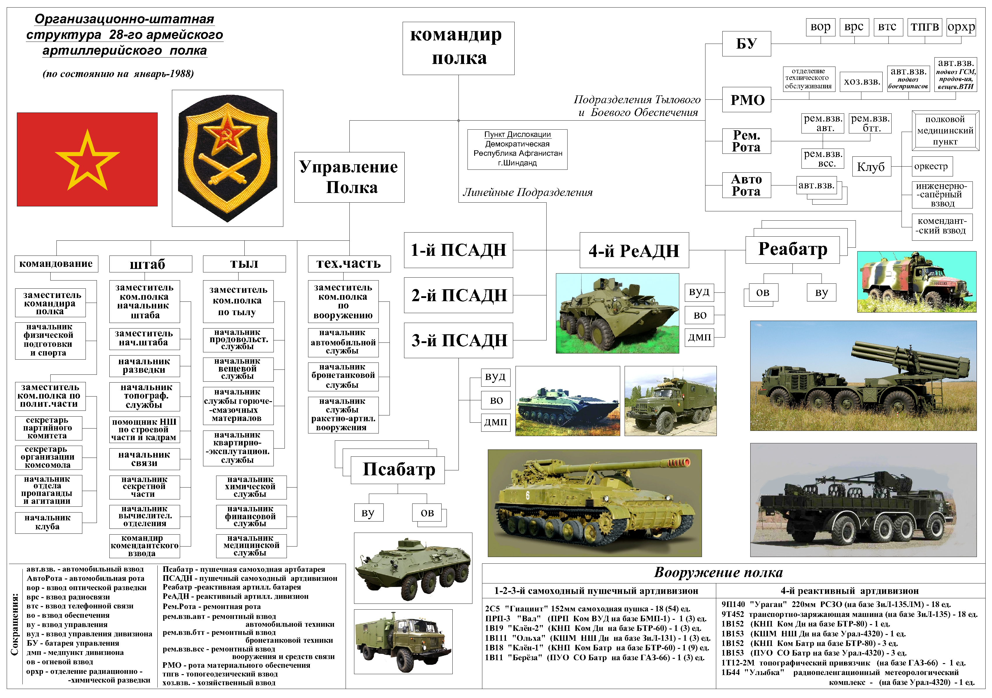 Организационно-штатная структура 28-го армейского артиллерийского полка на январь 1988 года. Составлено на данных взятых с сайта 28-го аап описания системы управления 1В126 («Капустник-Б») и данных с сайта - Реактивная система залпового огня 9К57 "Ураган"